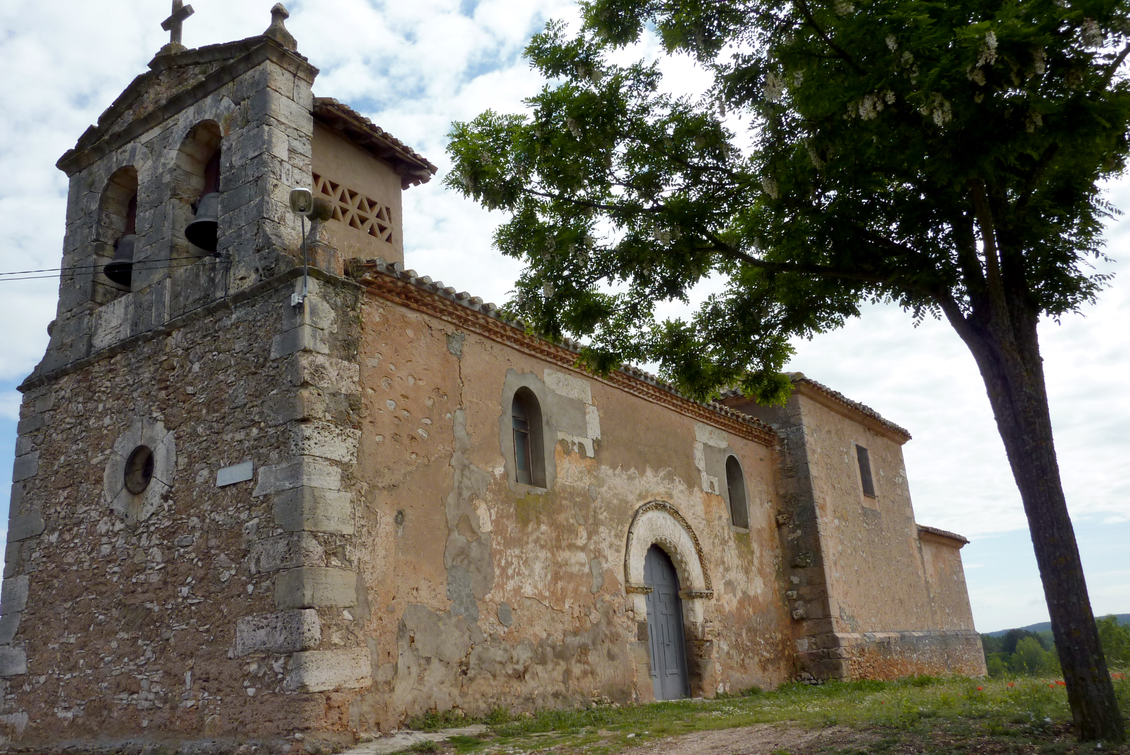 Katholische Pfarrkirche Nuestra Señora del Espino in Barcebal in der spanischen Provinz Soria (Castilla y León), Kirche aus dem 17. Jahrhundert mit romanischem Portal (Nuestra Señora del Espino Circulo Románico)